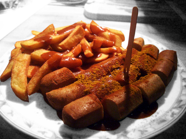 Vegetarisch / vegane Currywurst aus dem Supermarkt